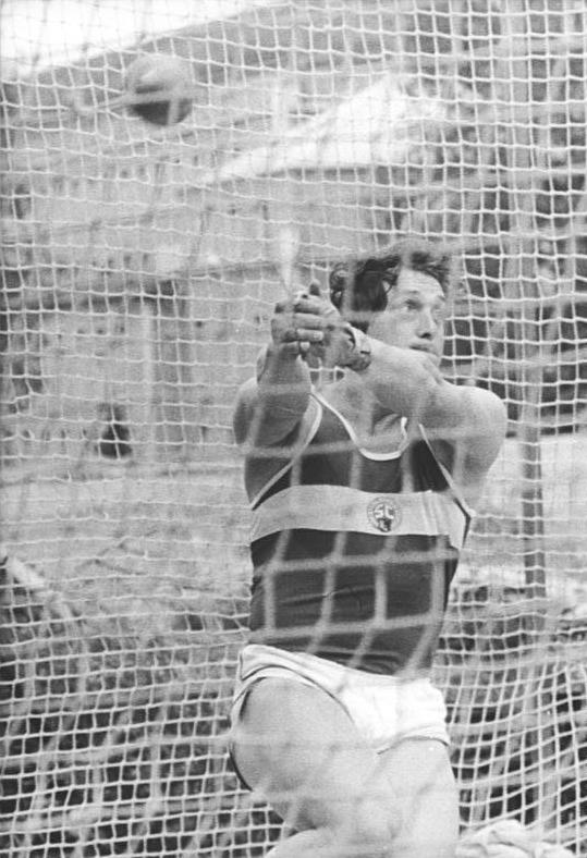 Ralf Haber ADN-ZB Ludwig-03.06.1984 Erfurt: 35.DDR-Meisterschaften in der Leichtathletik-Im Hamerwerfen wurde Ralf Haber vom SC Karl-Marx-Stadt mit 78,04 m DDR-Meister.